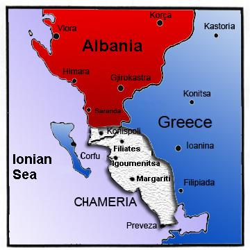 Chameria map